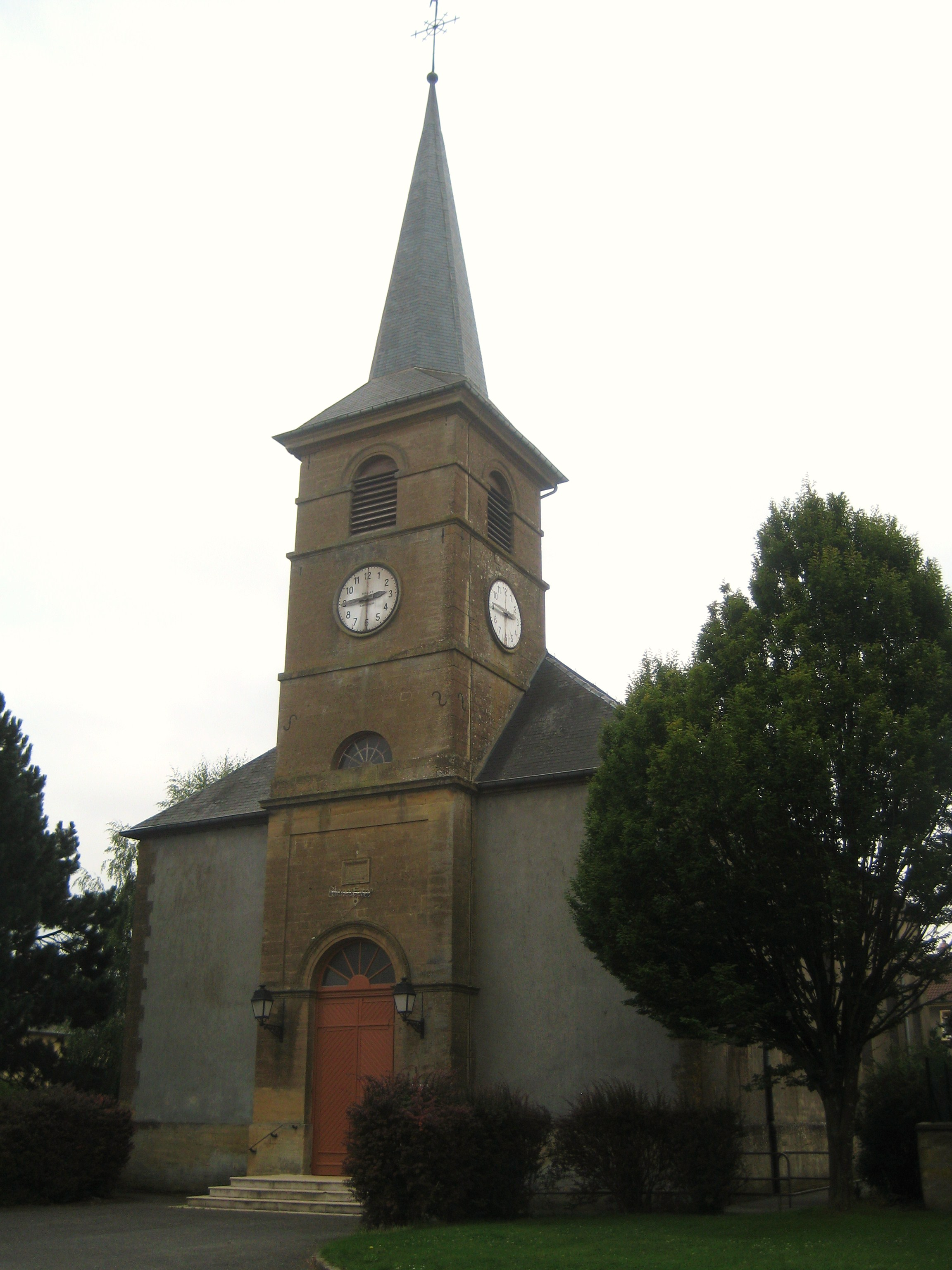 Eglise Saint-Jean de Havange